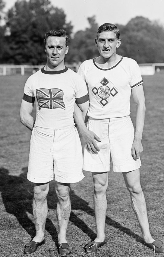 Abrahams, d'Arcy [les deux premiers du 100m plat lors de la rencontre annuelle d'athlétisme entre le Stade Français et les Polytechnic Harriers de Londres au stade de la Faisanderie à Saint-Cloud, 12-9-1920] : [photographie de presse] / [Agence Rol]